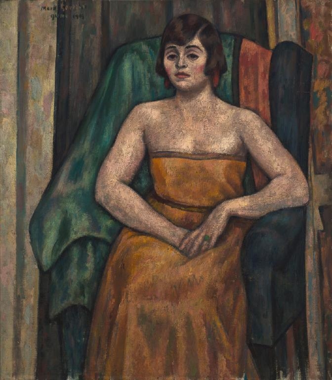 Portrait of Valentine Dobrée